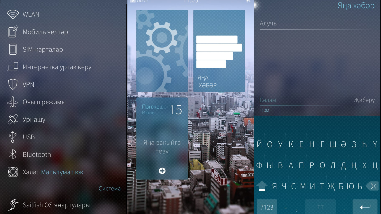 Татарча/tatarça: Sailfish OSның татар юрамасы